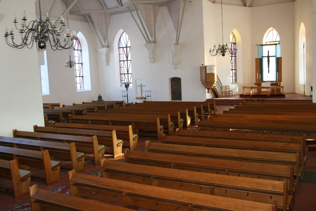 Kirche in Kambja